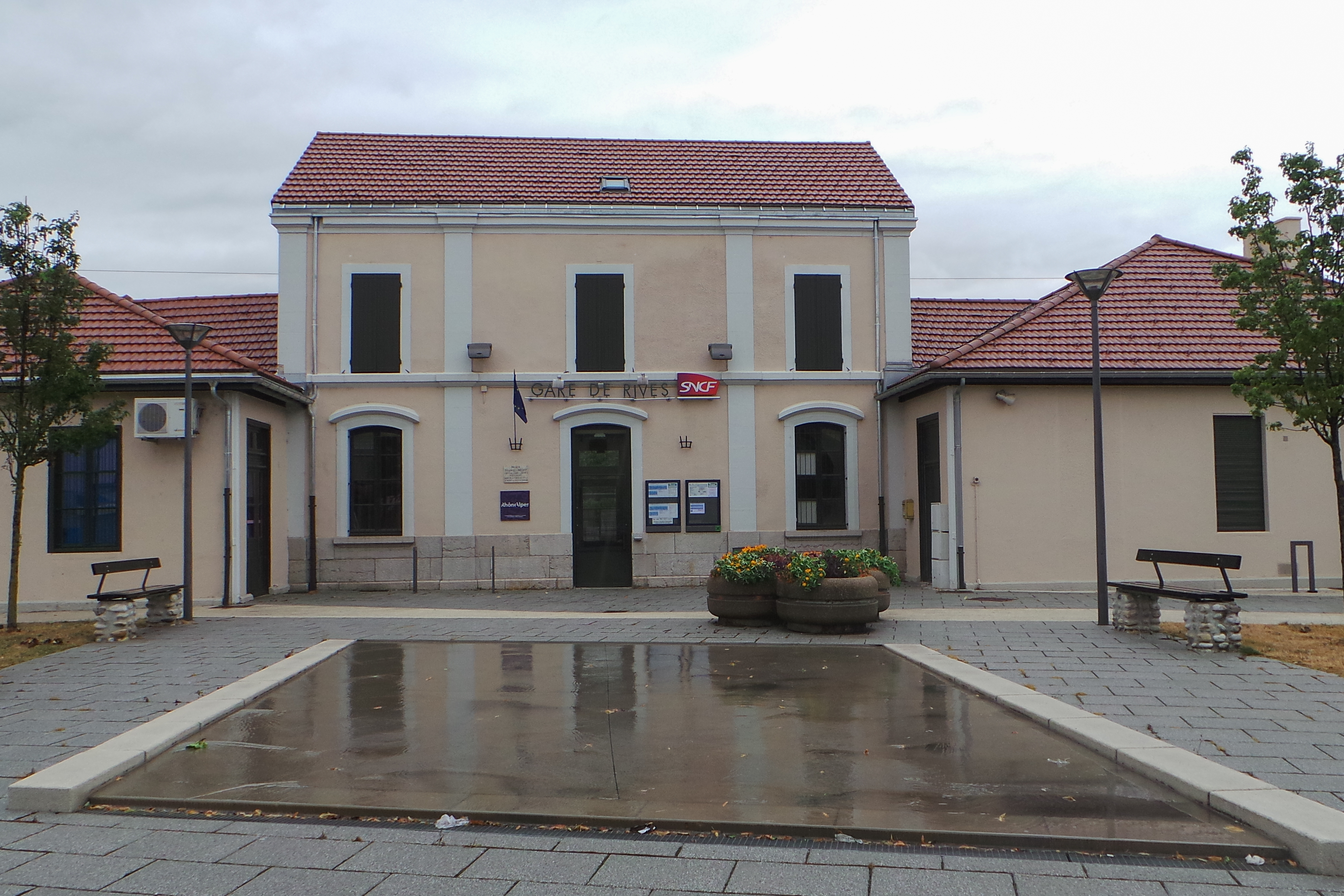 Gare de Rives / Rives, Isère, France